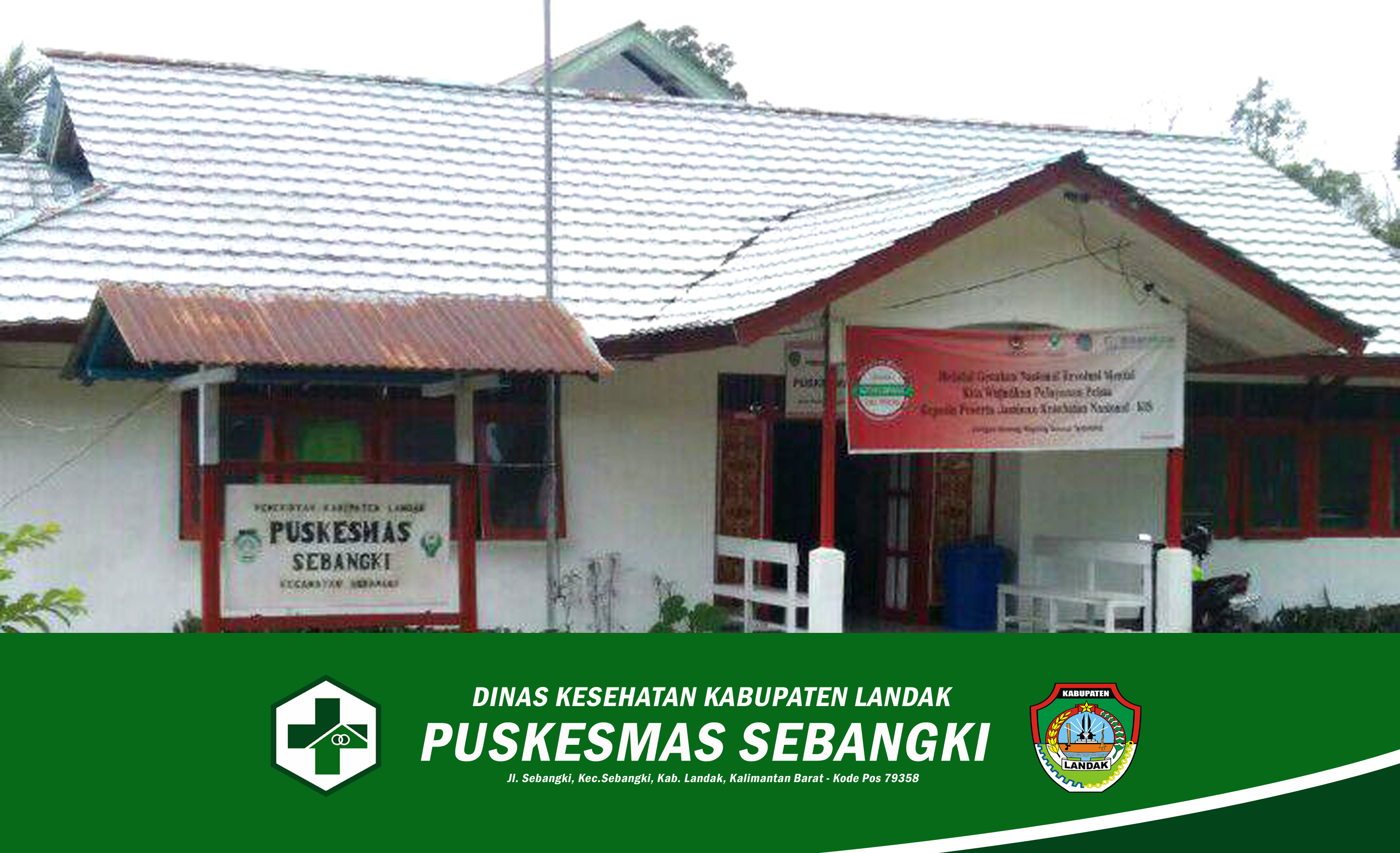 Foto Gedung Puskesmas Sebangki